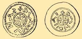 Gejza I - knižecí denáry